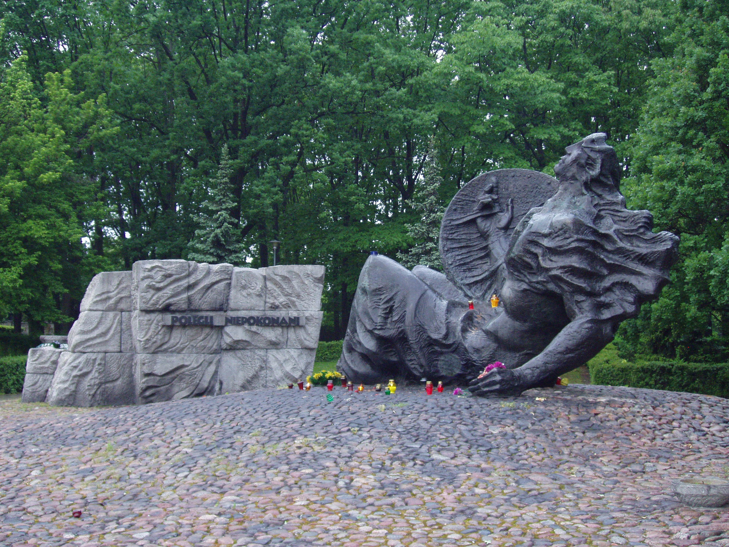 Pomnik Polegli Niepokonani, Gustaw Zemła, Cmentarz Powstańców Warszawy, Warszawa, historia cmentarza